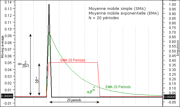 Moving average